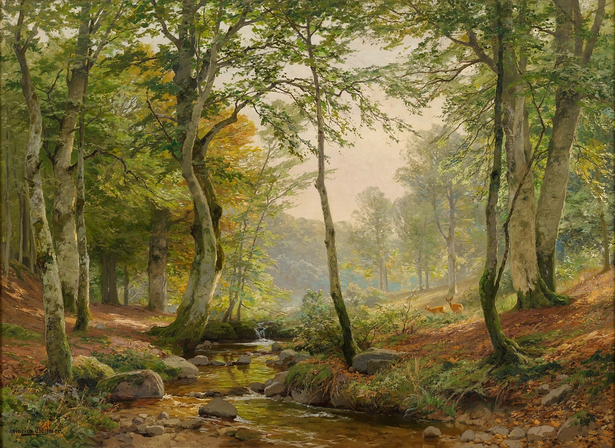 Waldlichtung mit Wildbach. Signiert. Öl/Lwd., 80 x 110 cm